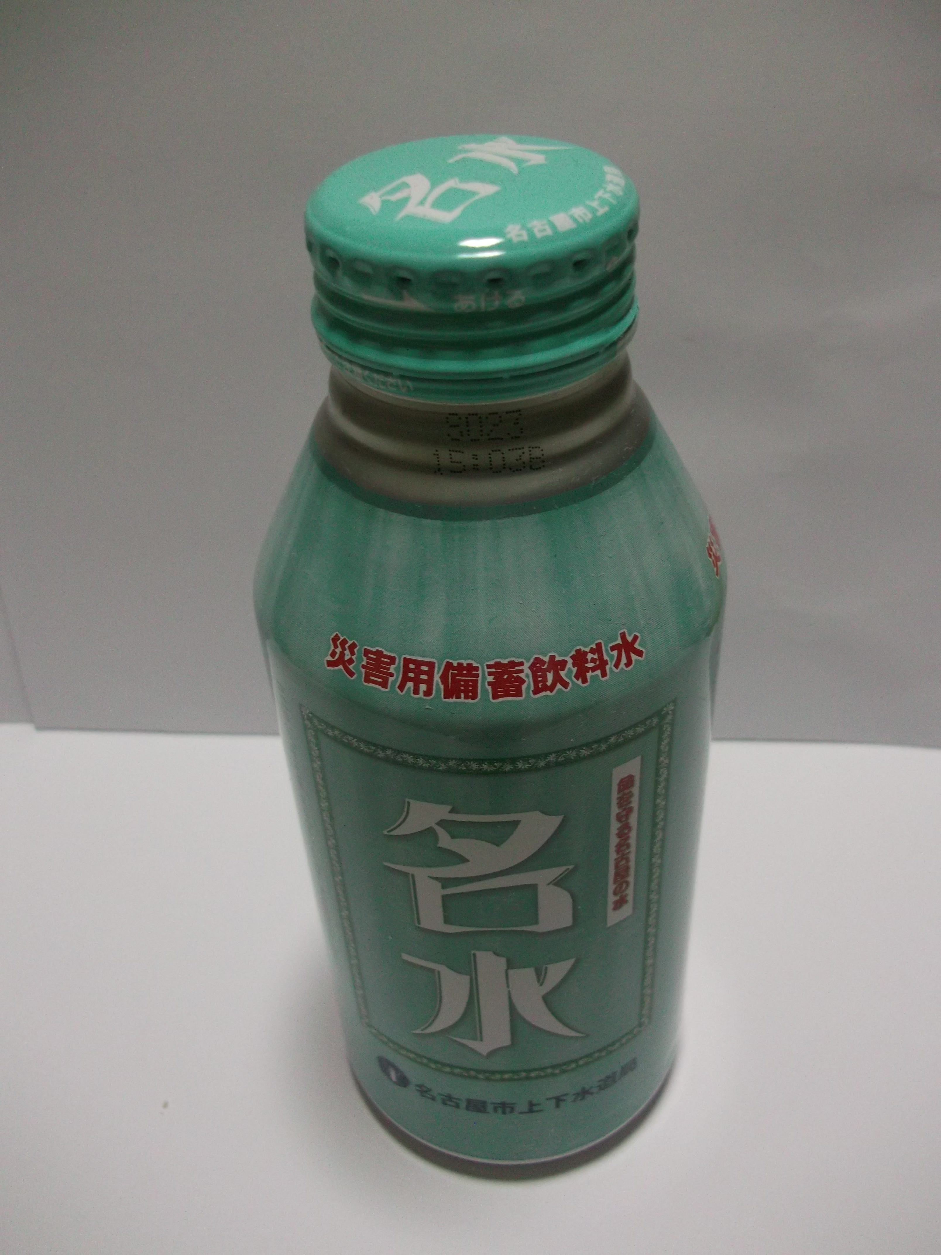 名古屋市上下水道局の災害備蓄向け水道水ボトル「名水」。